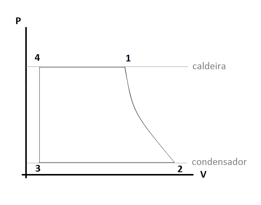 Gráfico para exemplificação do processo ideal do ciclo termodinâmico higroscópico